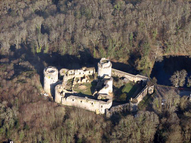 Photographie aérienne du château de Tonquédec prise le 11 février 2006